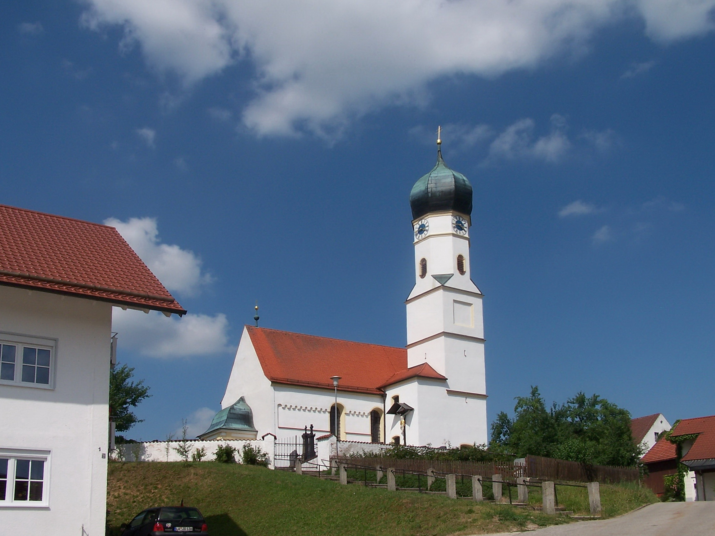 Hohenthann, Weihenstephan. Kirche St. Stephanus. Spätgotischer Bau der 2. Hälfte 15. Jahrhundert, Langhaus im 18. Jahrhundert barockisiert, Turm 1681 erhöht; mit Ausstattung.